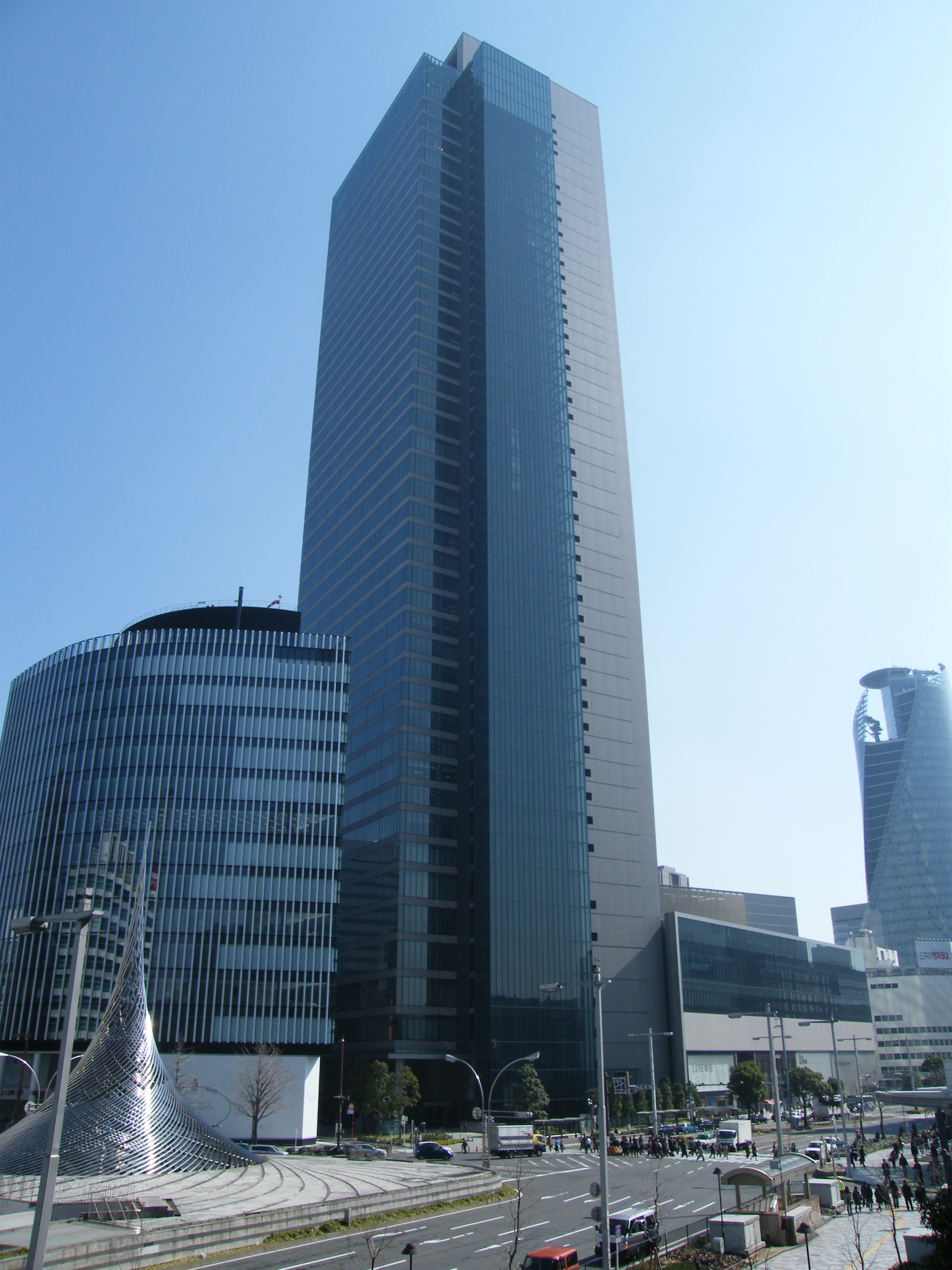 ミッドランドスクエア（中央のビル）